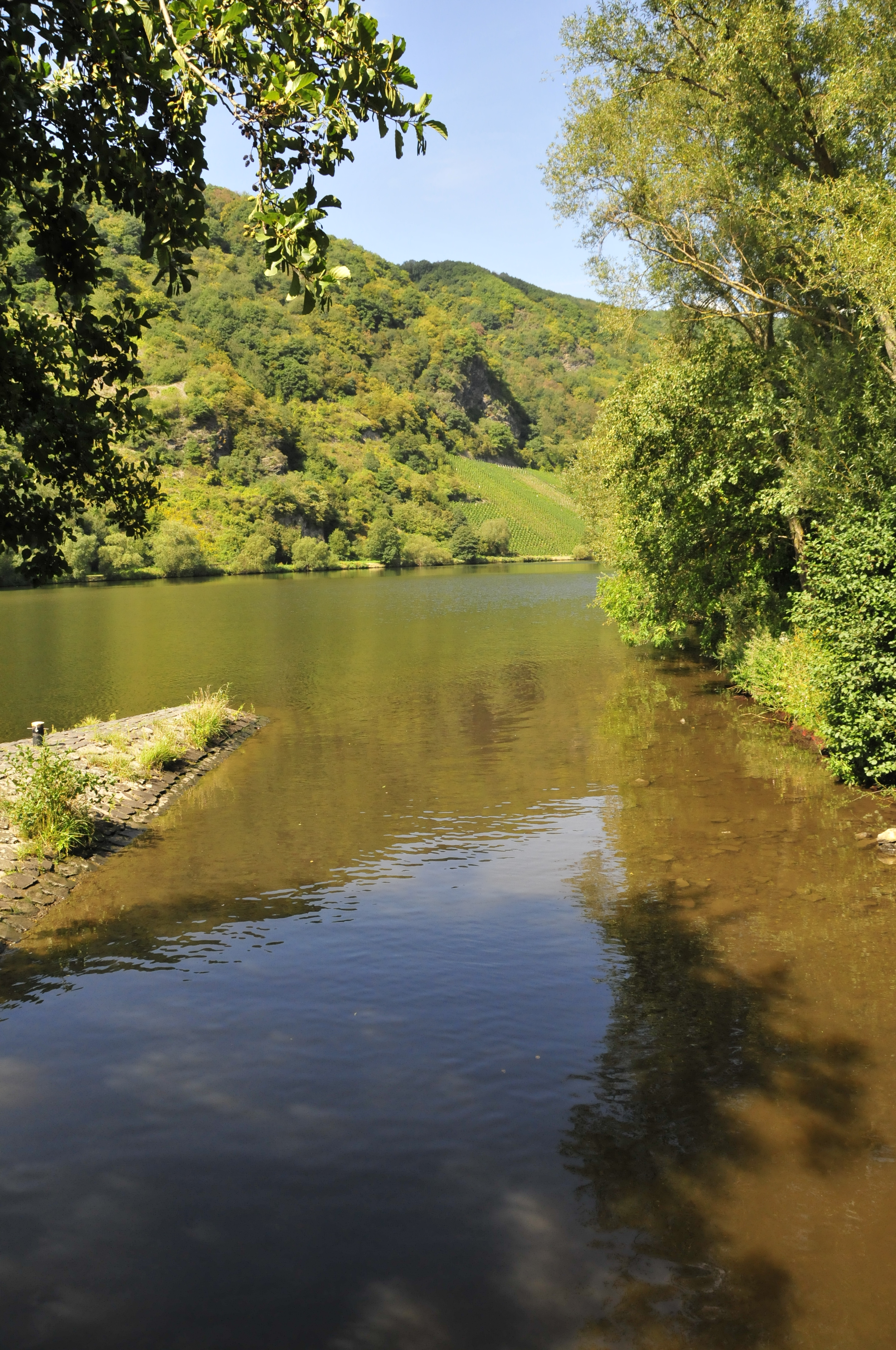 Mündung der Dhron in die Mosel